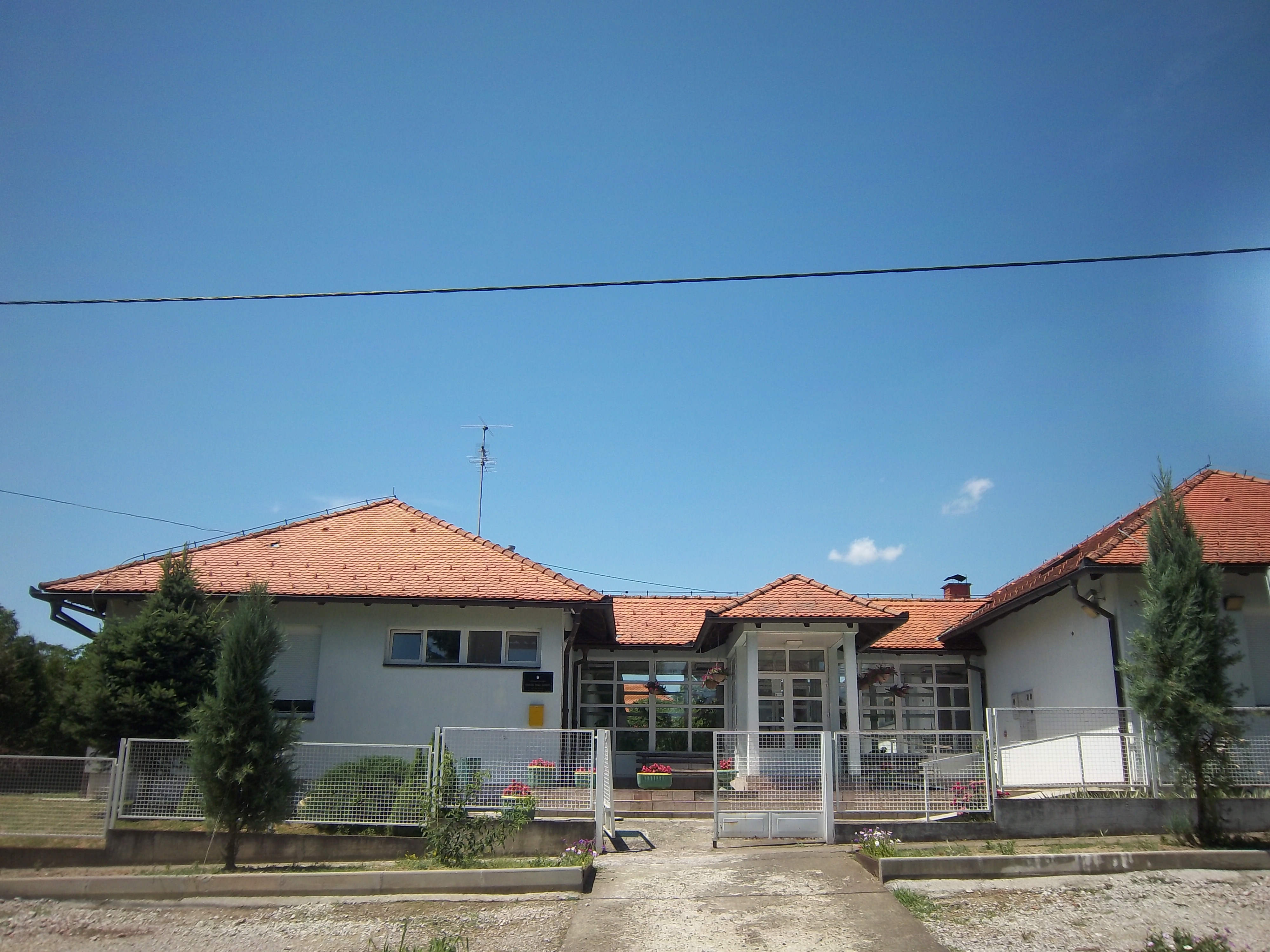 Srpskohrvatski / српскохрватски: Škola u Slakovcima, Republika Hrvatska